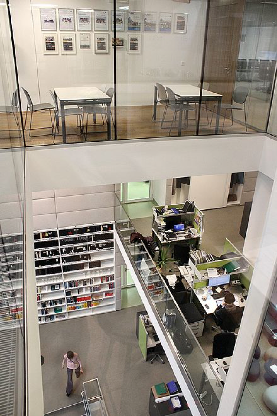 Wielopoziomowa architektura nowego budynku IMP, łącząca różne poziomy i funkcje.